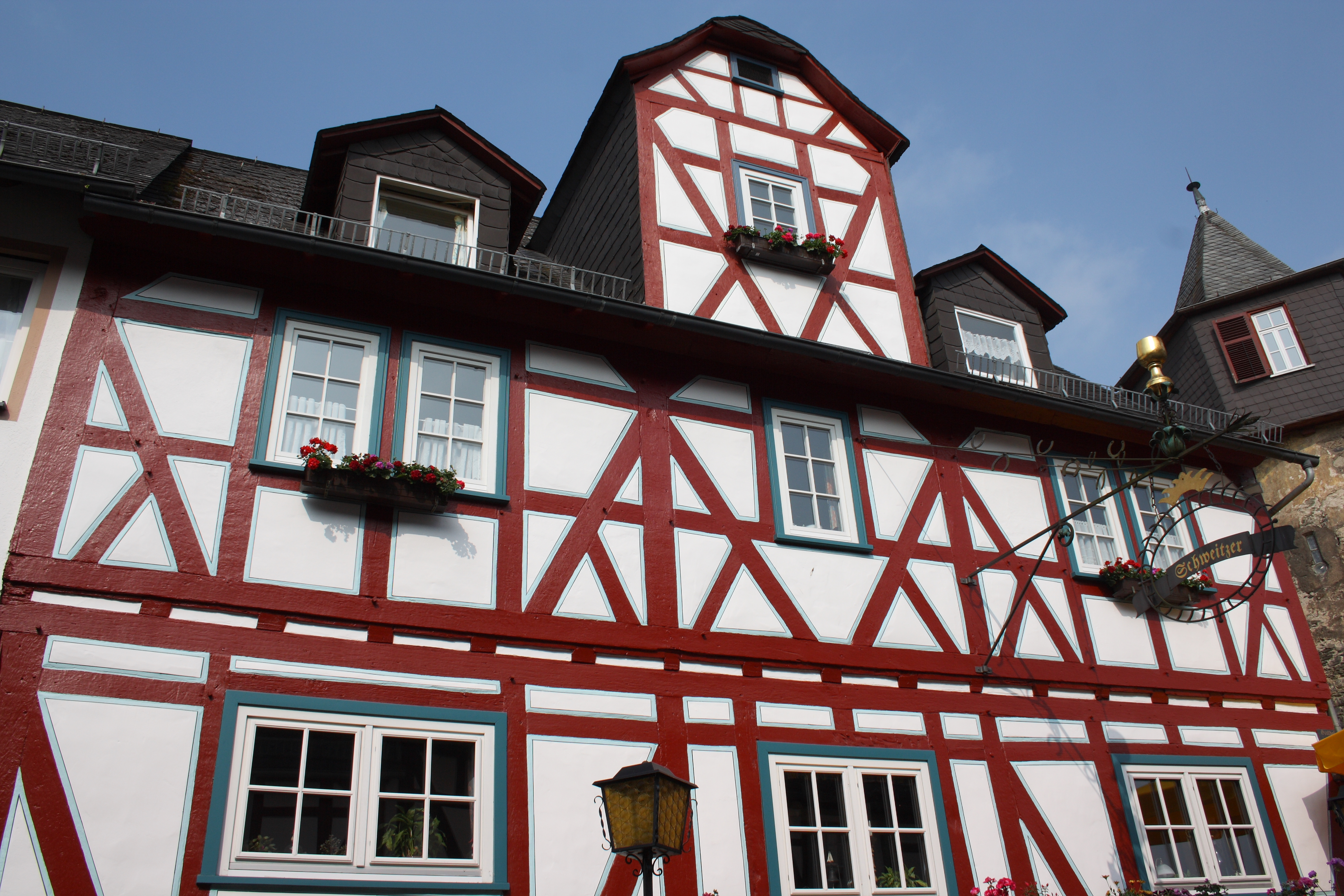 Haus Marktplatz 11 in Braunfels im Lahn-Dill-Kreis (Hessen)